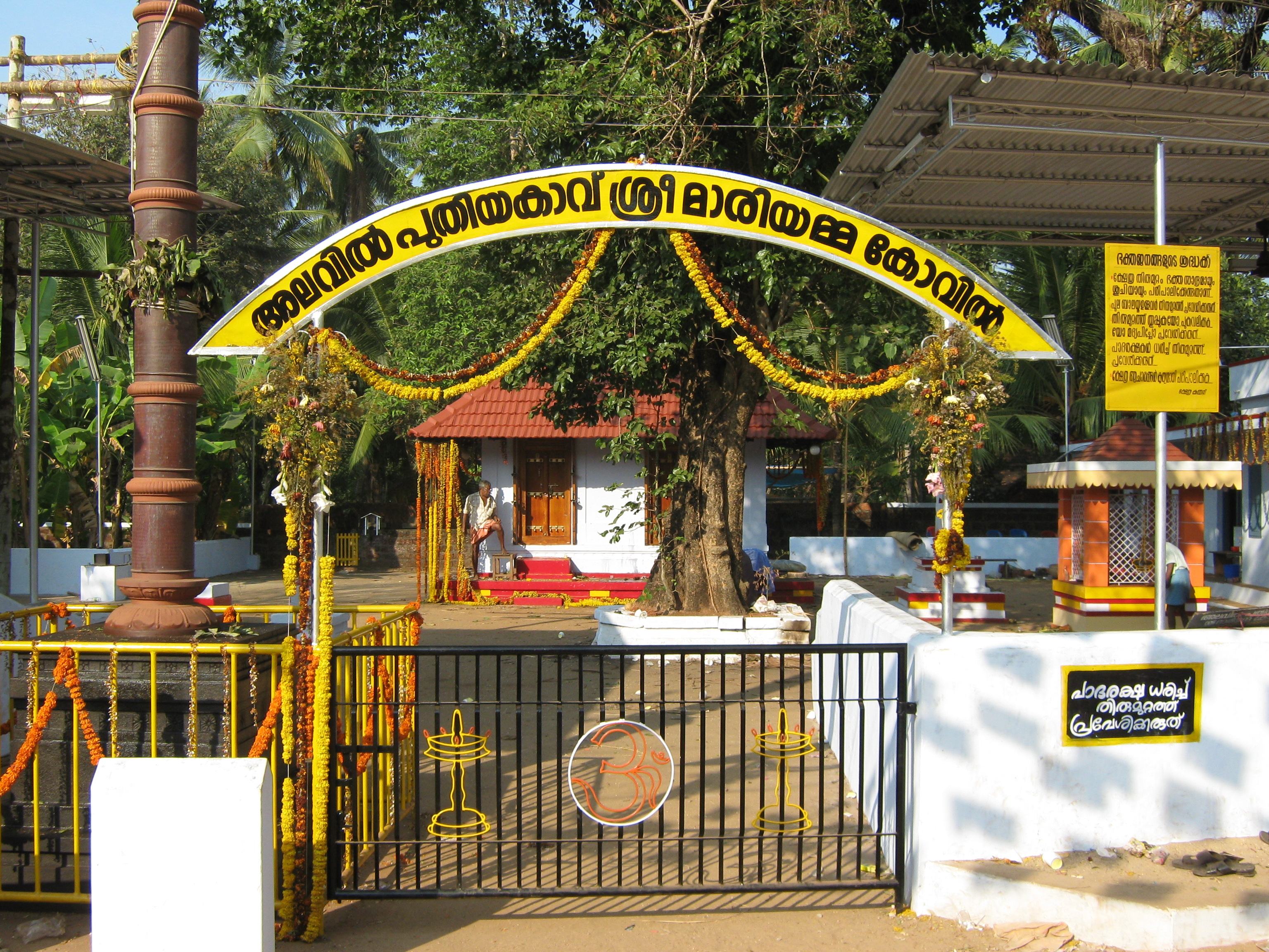 Alavil Mariyamma Kovil is about 5 km far from Kannur Town. Kannur, Kerala, India.